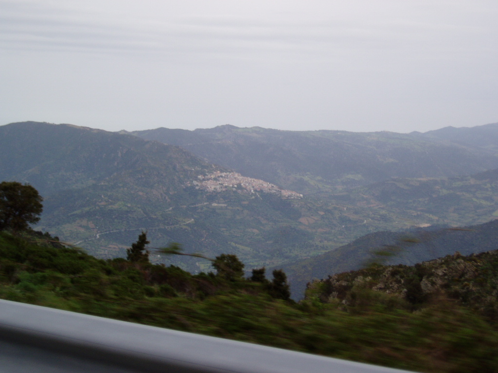 Panorama di Lodé (Nuoro); Gabriele Sanna, foto scattata da me